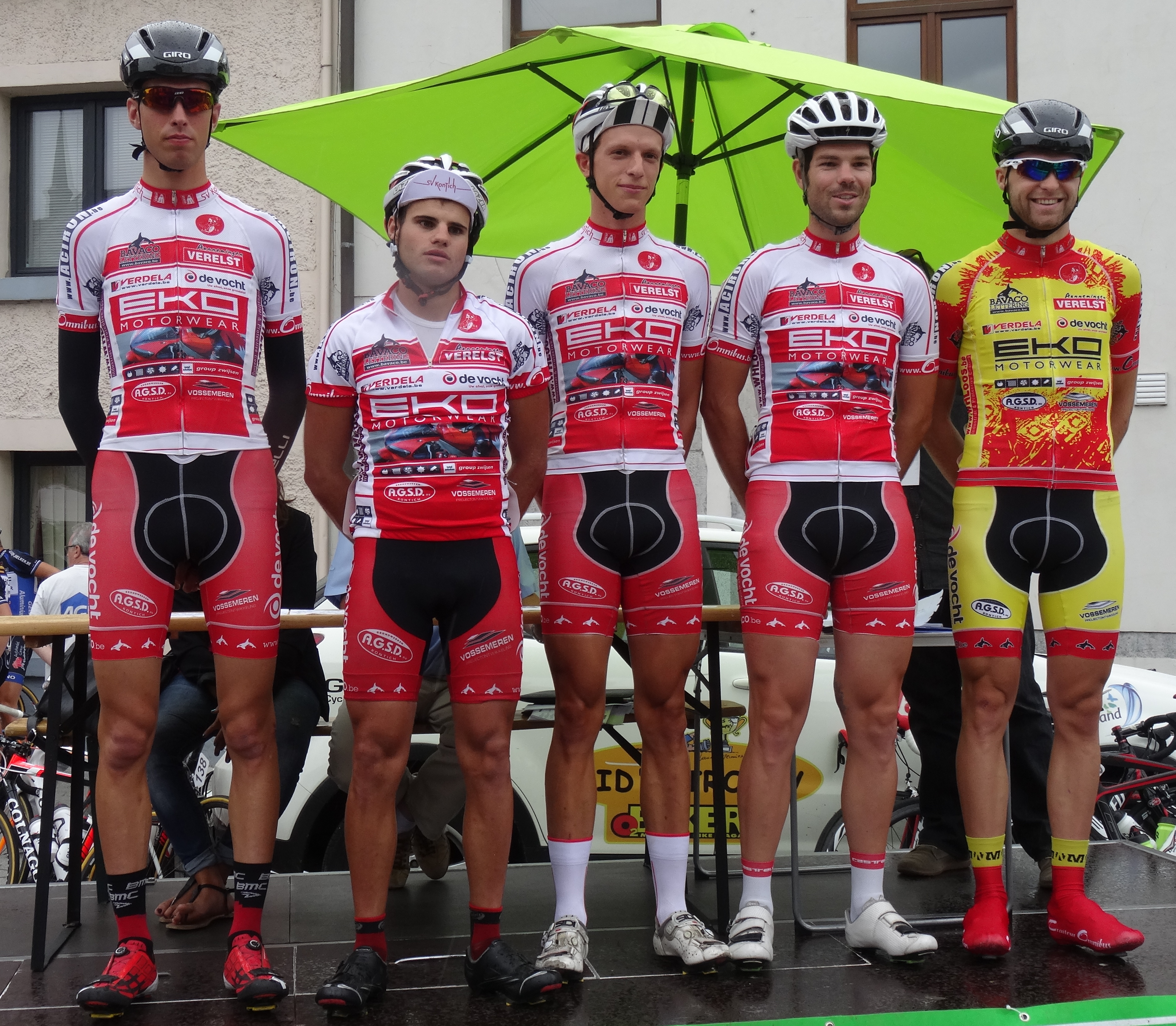 Reportage photographique réalisé le mercredi 6 août à l'occasion du départ de la première étape du Tour de la province de Namur 2014 à Jambes (Namur), Belgique.